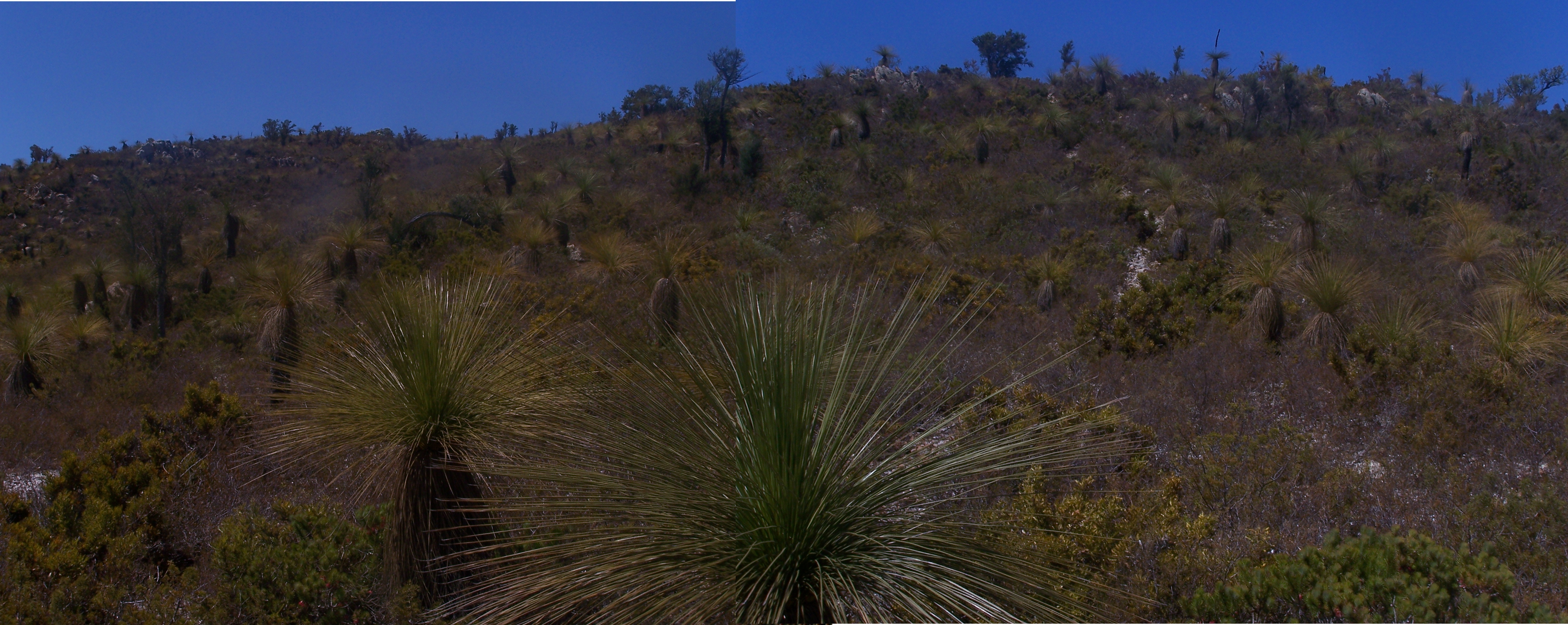 Ellis brook reserve